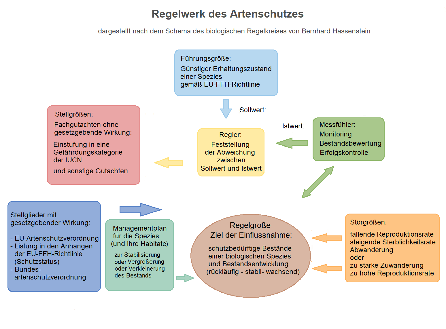 Regelwerk beim Artenschutz